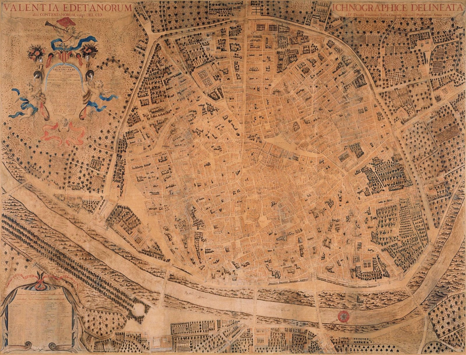 Plànol de València de Tomàs Vicent Tosca i Mascó, 1704, Valentia Edetanorum aliis Contestanorum, vulgo del Cid.